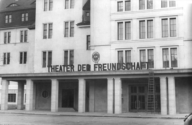 Berlin, Theater der Freundschaft, Eingang Illus Rudolph Hein-Leu. 15.11.1950 Theater der Freundschaft. Am 16.11.1950 wurde des Theater der Freundschaft, Berlin-Lichtenberg, Parkaue 25, mit dem Theaterstück Du bist der Richtige eröffnet. Intendant des neuen Theaters ist Hans Rodenberg. UBz: Aussenansicht.